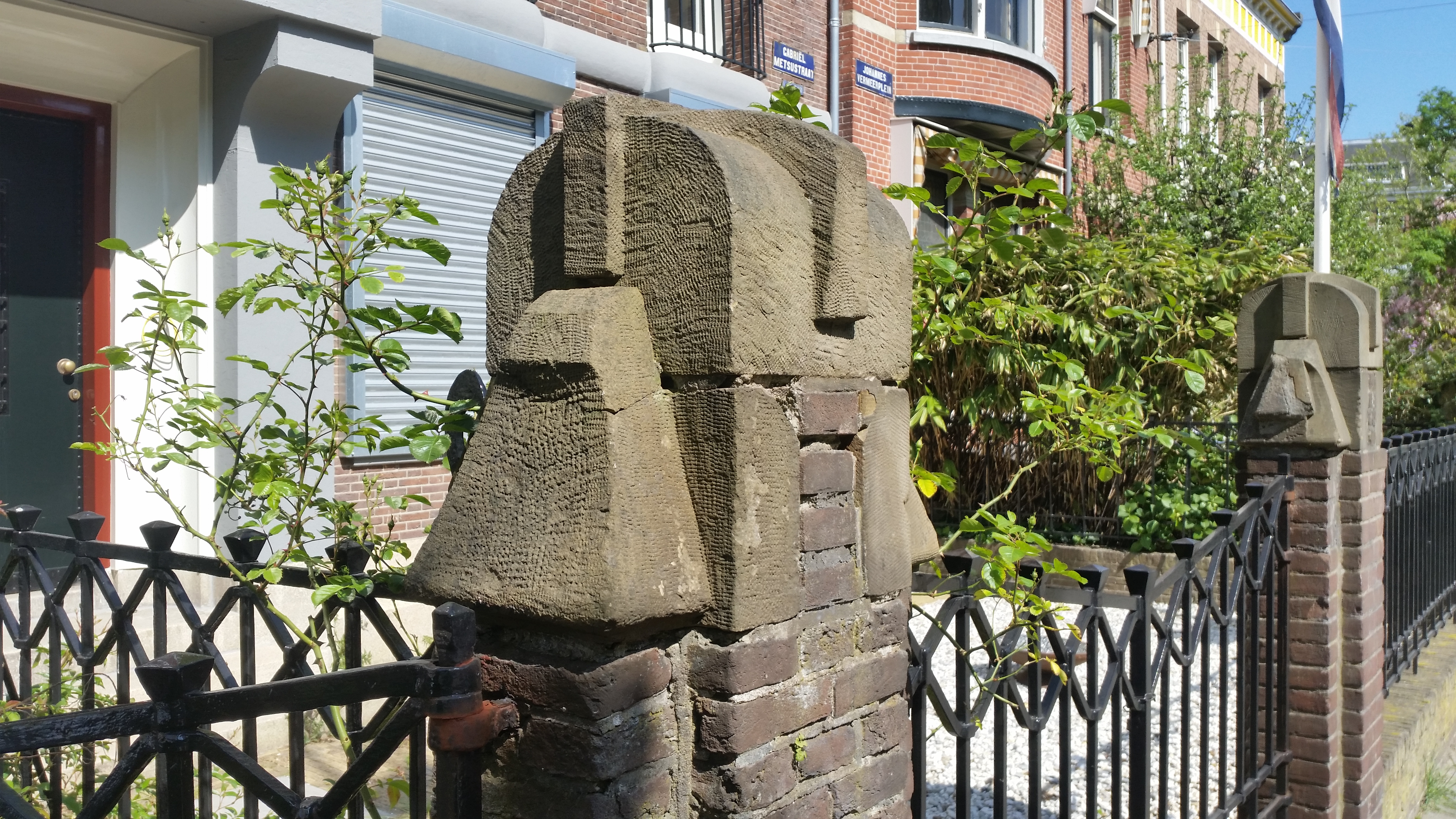 Impressie van Gabriël Metsustraat 11-13 (huisnummer 9 is vervallen) te Amsterdam-Zuid